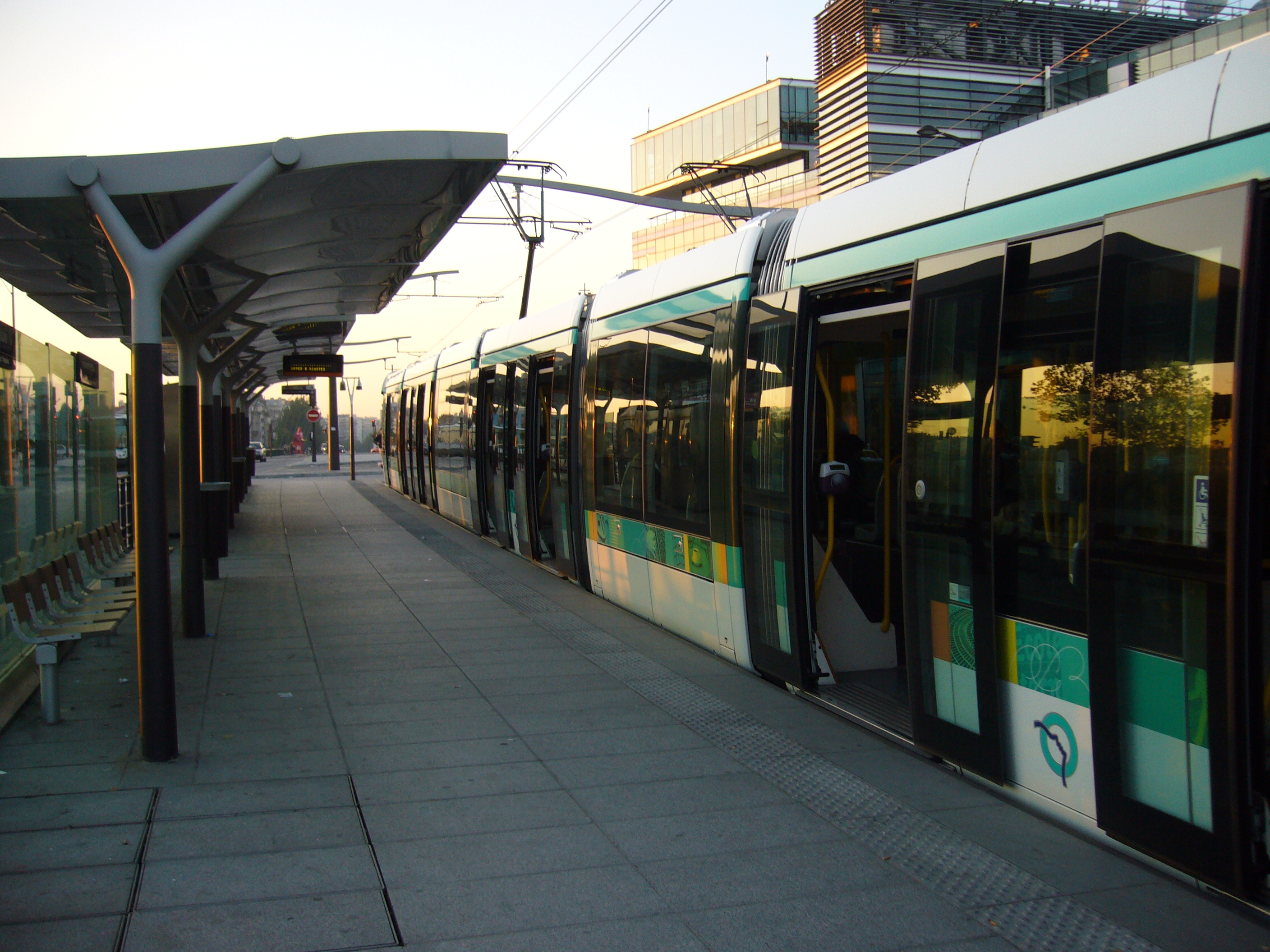 Rame de tramway Citadis stationnés à la station Pont du Garigliano de la ligne T3 du tramway d'Île de France.